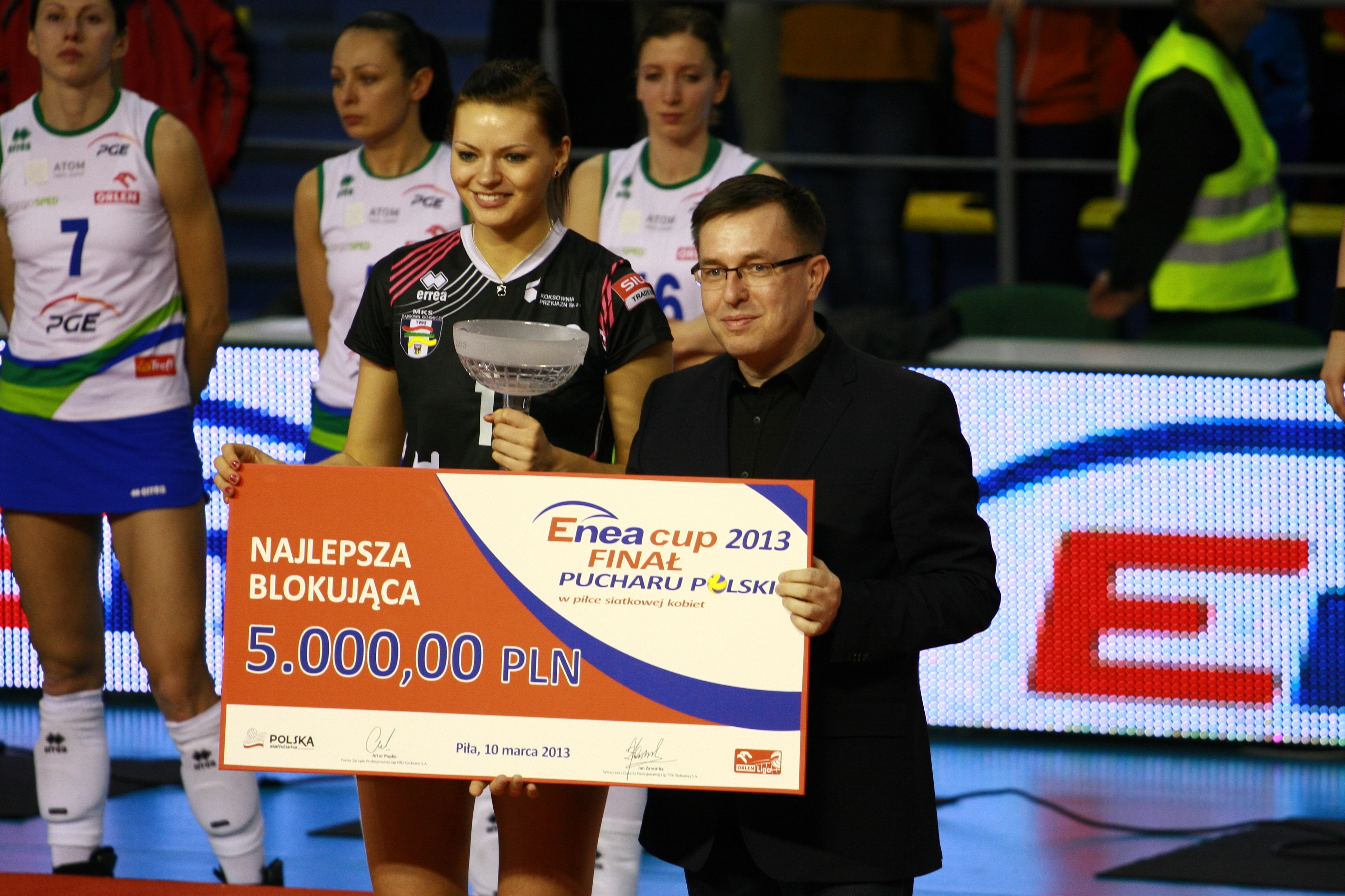 Atom Trefl Sopot Bank BPS Muszynianka Fakro Muszyna Tauron MKS Dąbrowa Górnicza Impel Gwardia Wrocław